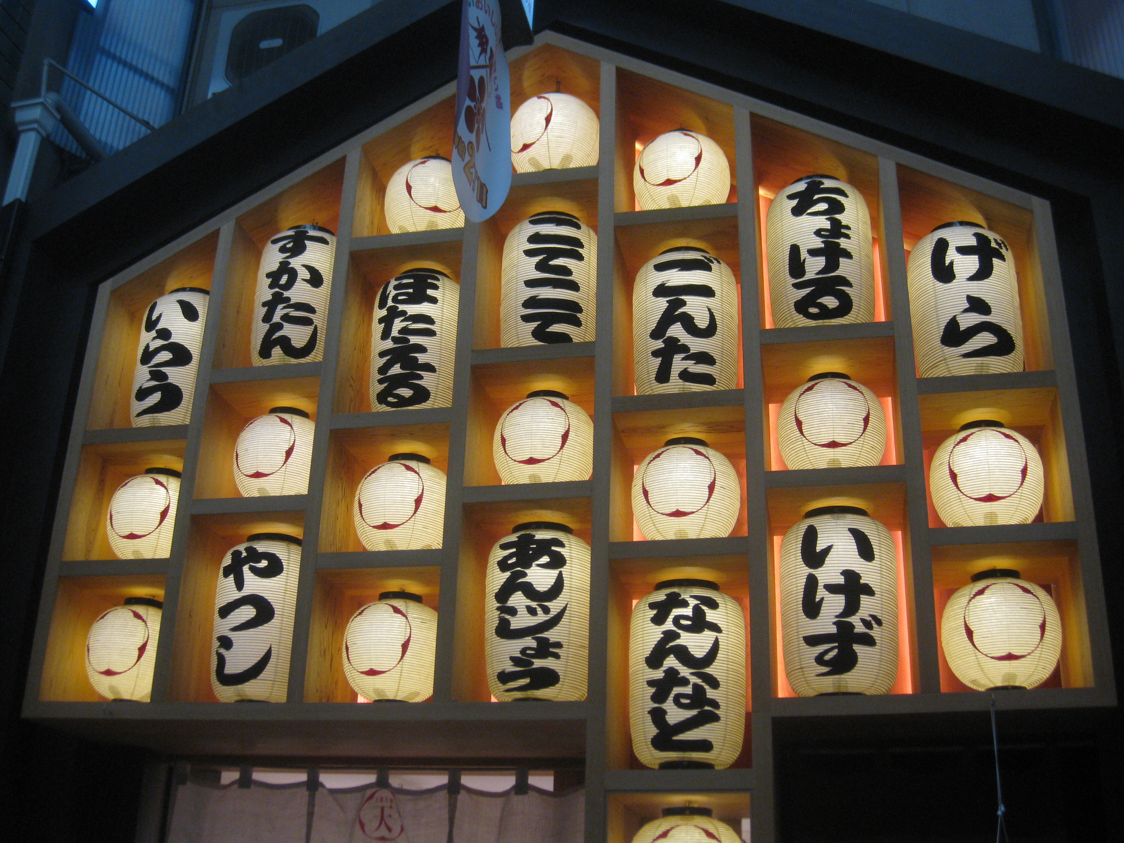 大阪市北区天神橋にある天満天神MAIDO屋の大阪弁看板